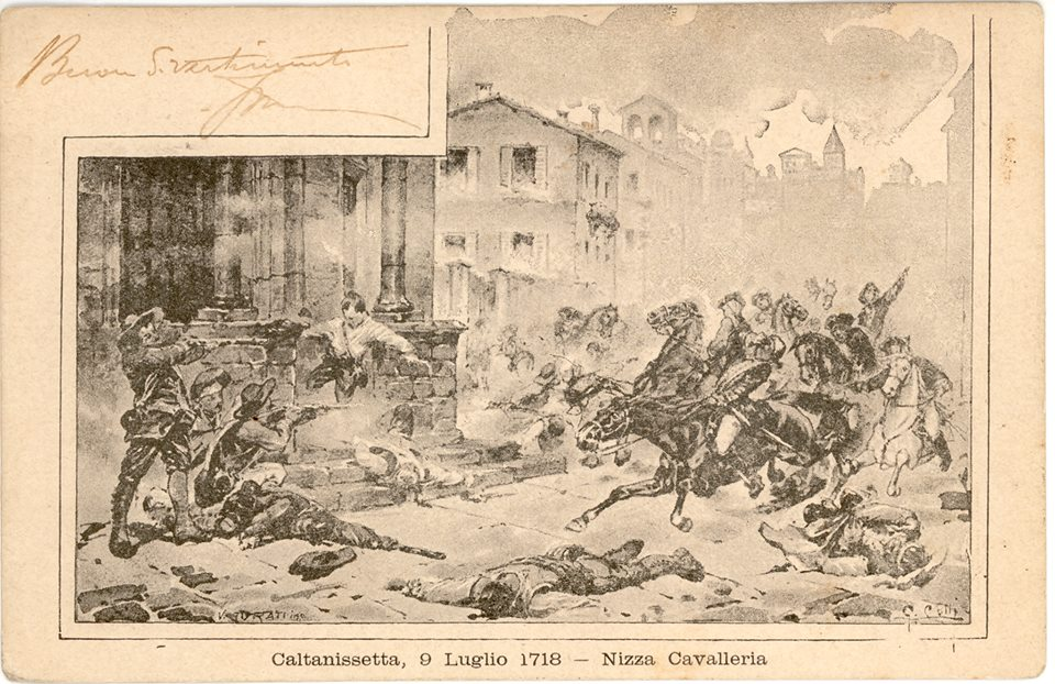 Cartolina con l’immagine della battaglia di Caltanissetta 1718